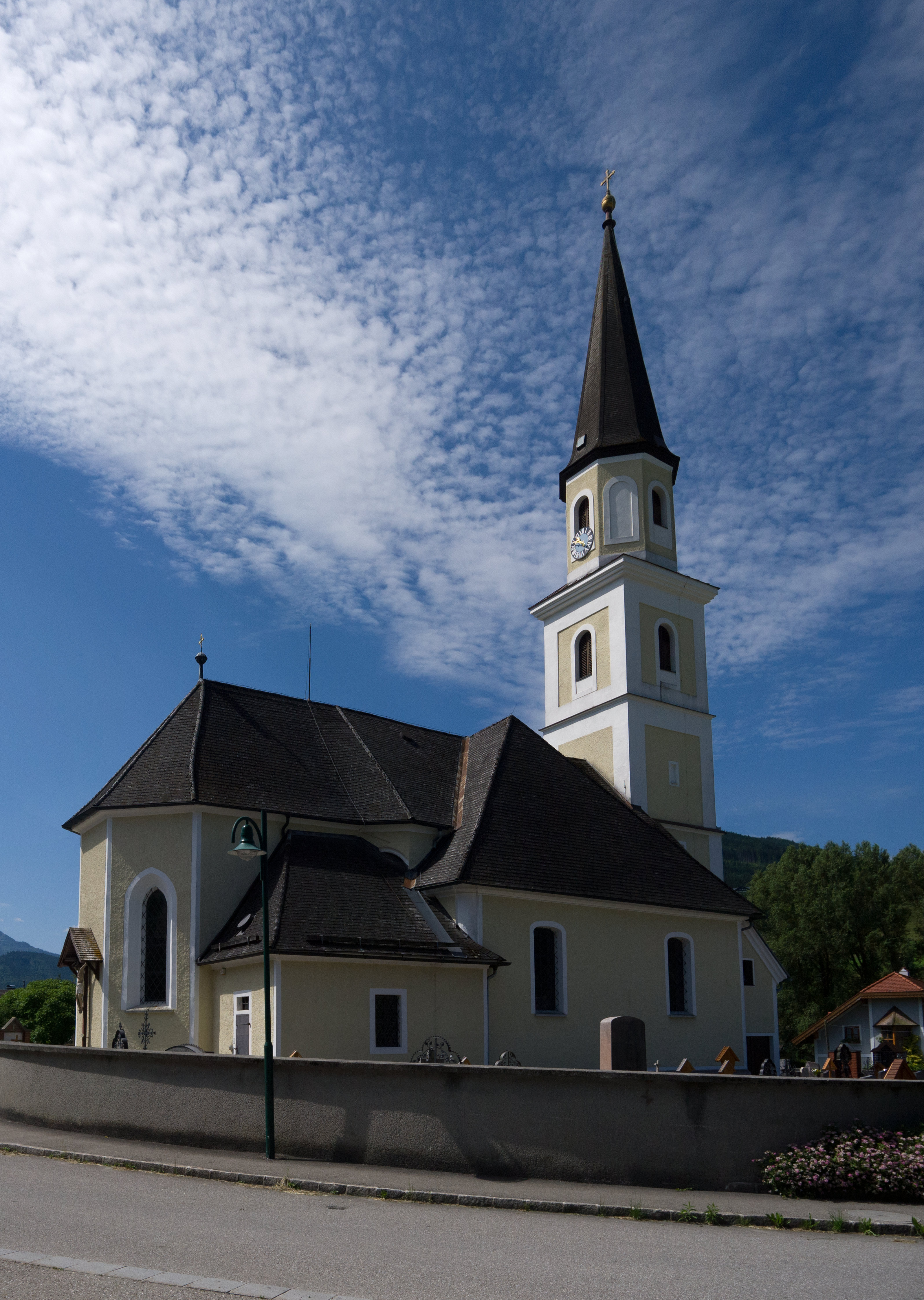 Kath. Pfarrkirche hl. Kilian mit Friedhof